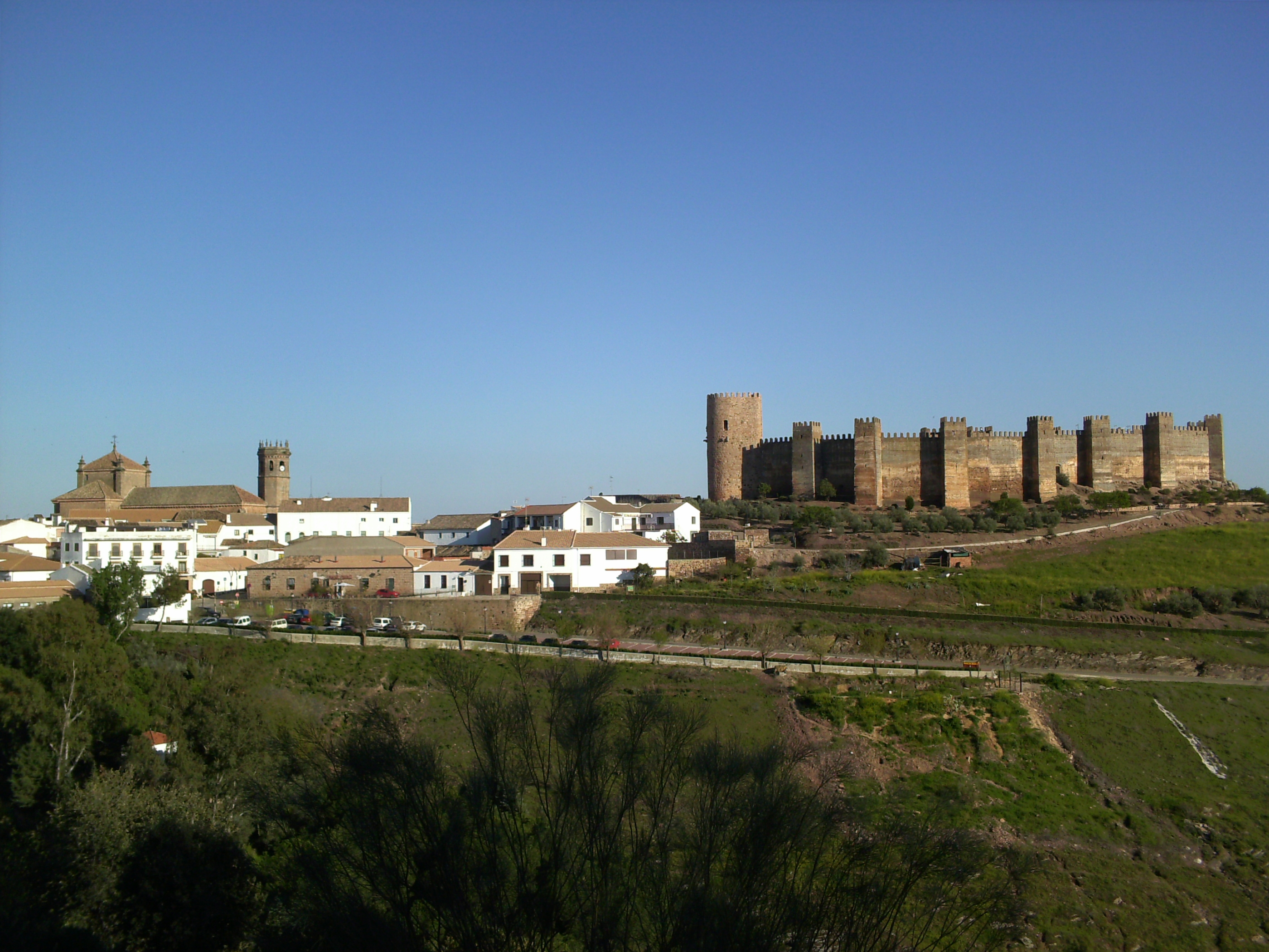 Vista de Baños de la Encina, con el castillo de Burgalimar y la iglesia de San Mateo.